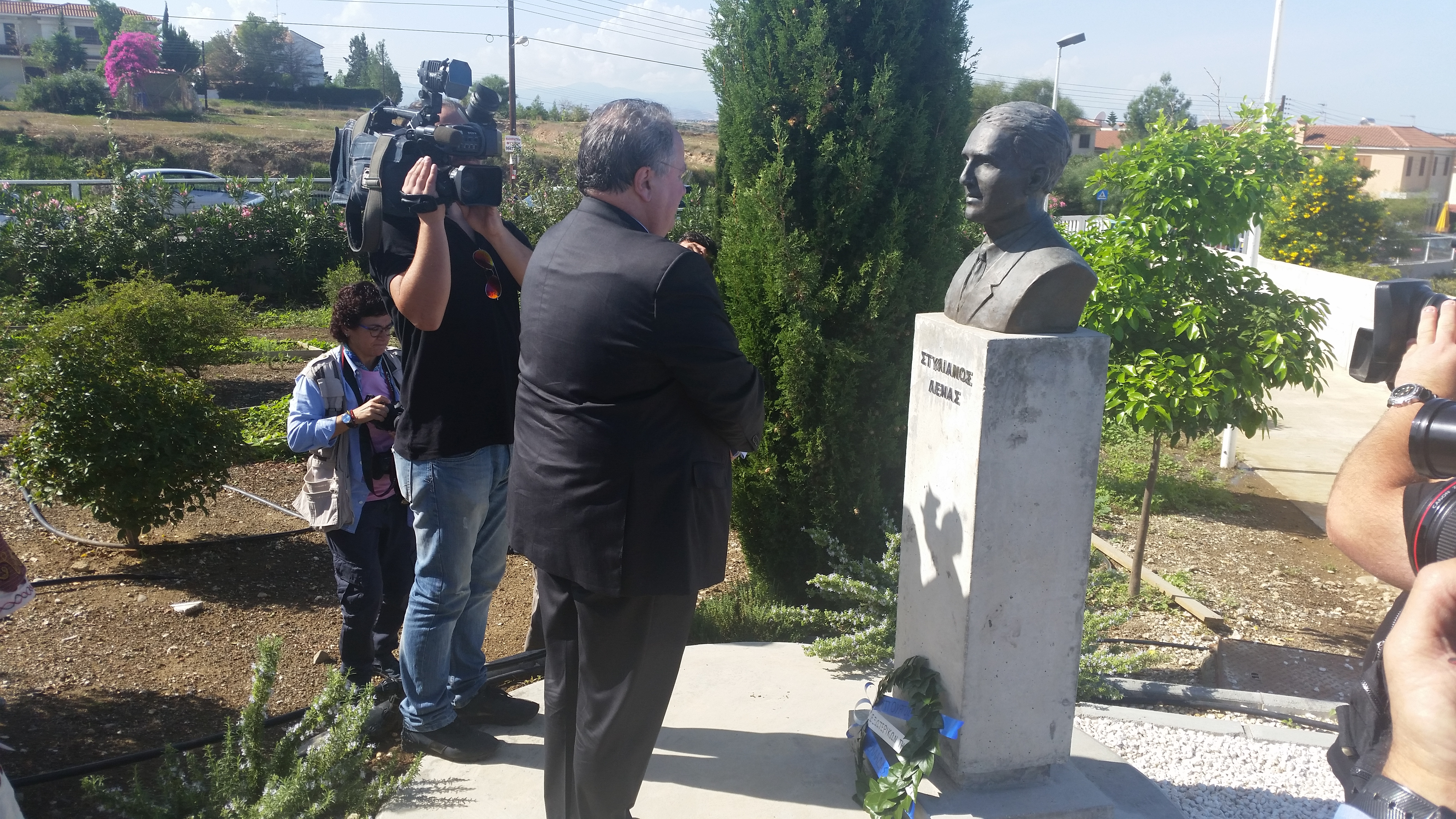 Κατάθεση στεφάνου στο Γ΄ Δημοτικό Σχολείο Μακεδονιτισσας. Ο Υπουργός Εξωτερικών, κ. Νίκος Κοτζιάς, πραγματοποιεί την πρώτη του επίσημη επίσκεψη στο εξωτερικό κατά τη νέα του θητεία και θα μεταβεί, από τις 26 έως τις 28 Οκτωβρίου, στην Κυπριακή Δημοκρατία.